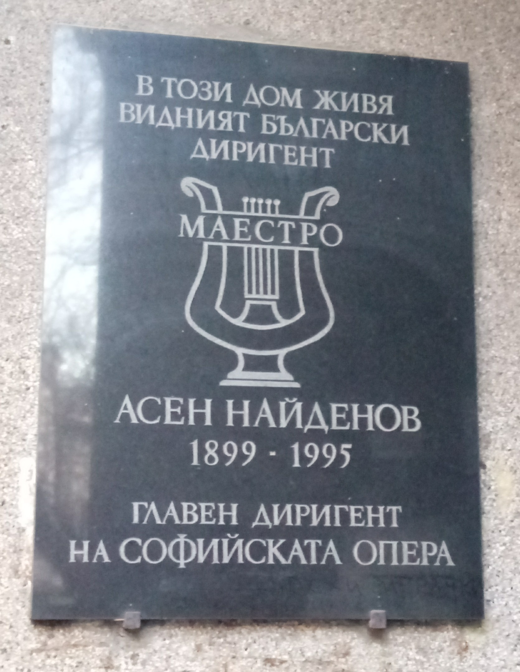 Asen Naydenov memorial plaque, 45 Solunska Str, Sofia